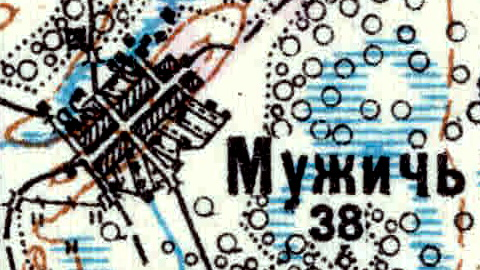 Топографическая карта Ленинградской области, квадрат VIc-27 (Залустижье), деревня Мужич